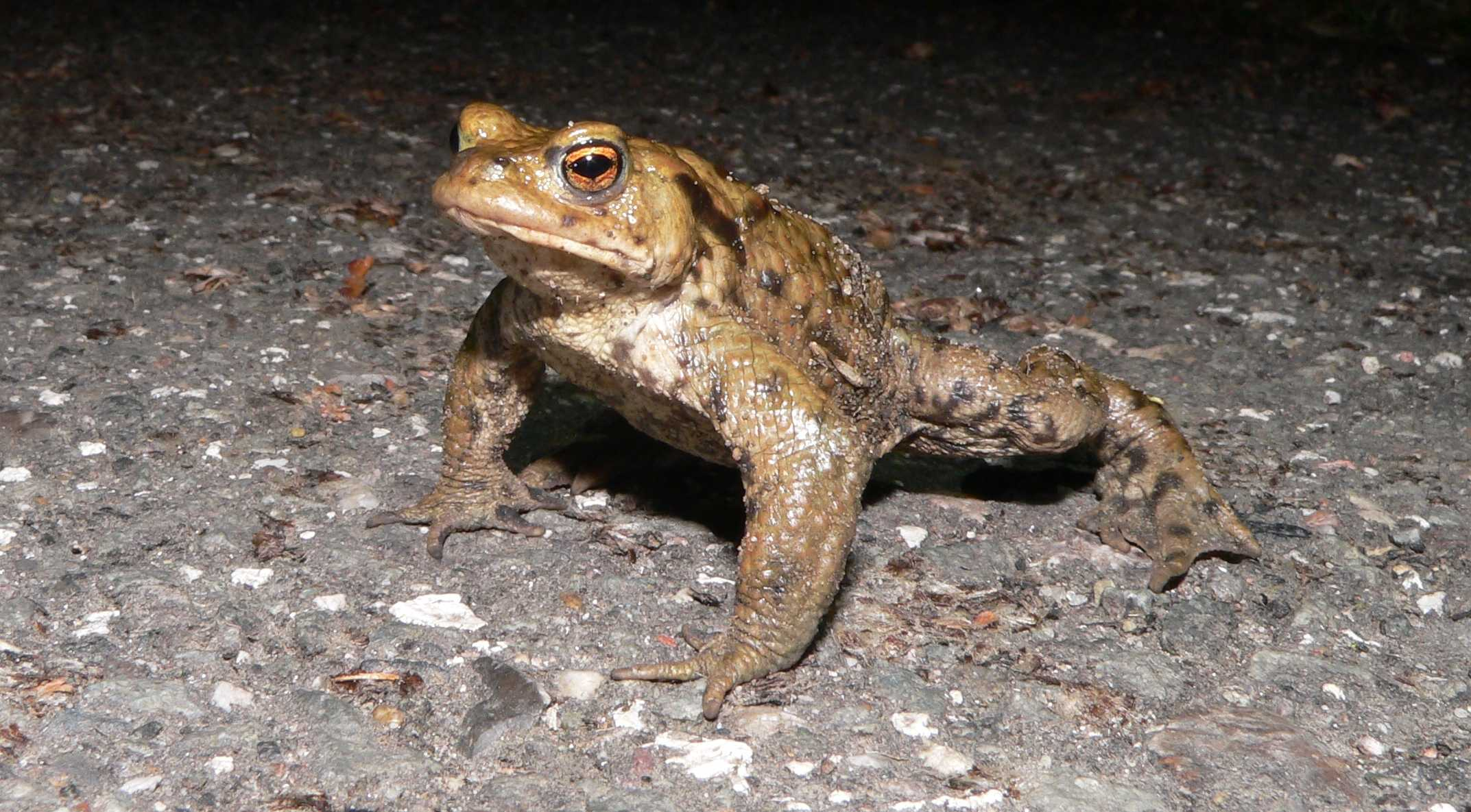 Eine männliche Erdkröte auf dem (befahrenen) Reitdeich.